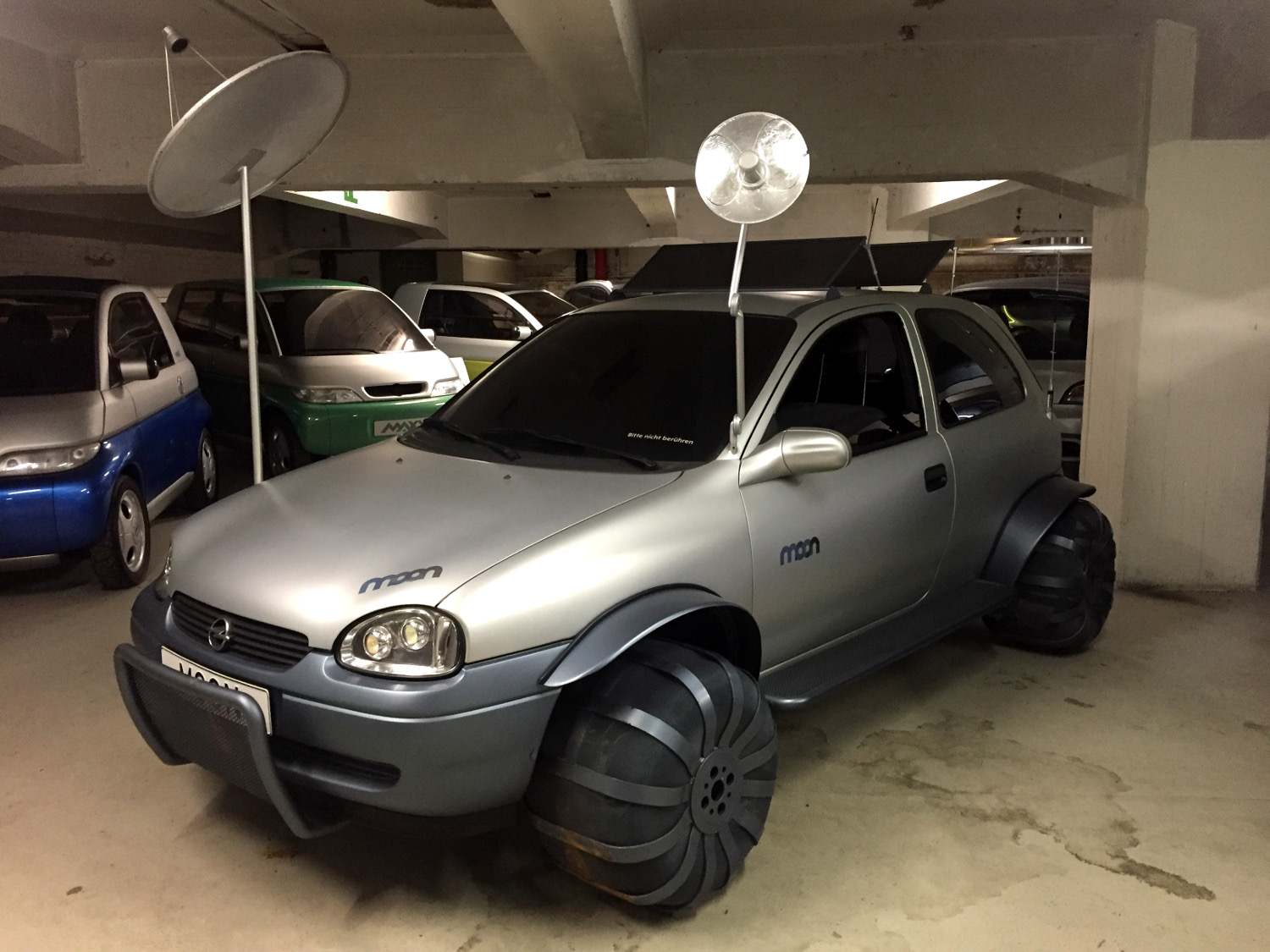 Opel Corsa Moon Prototyp